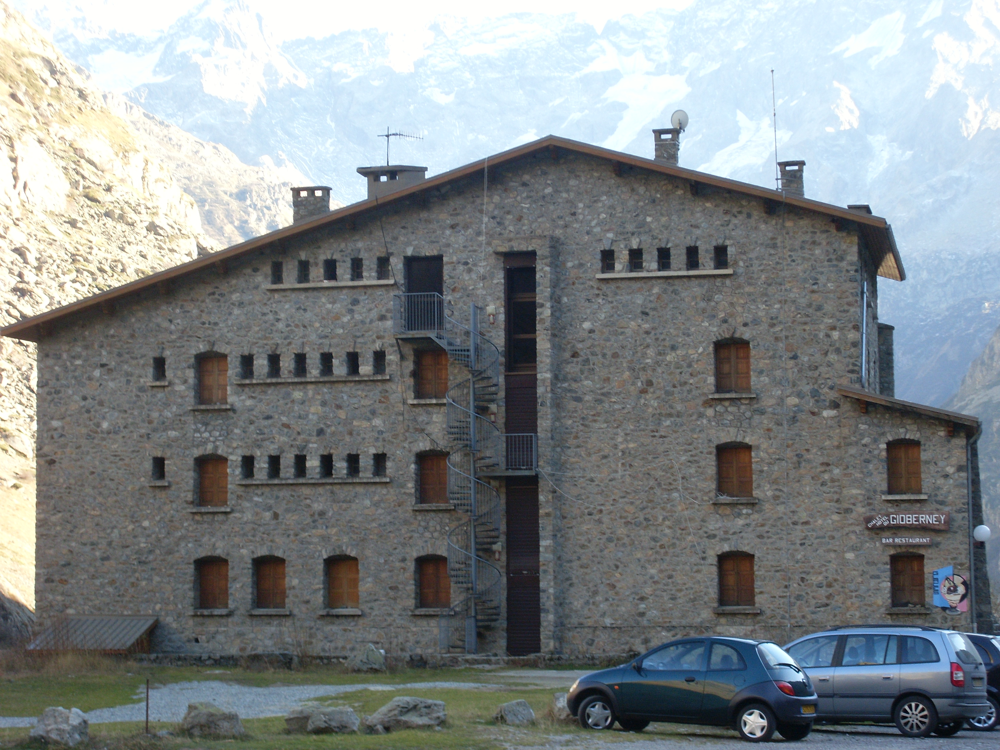 Challet du Gioberney